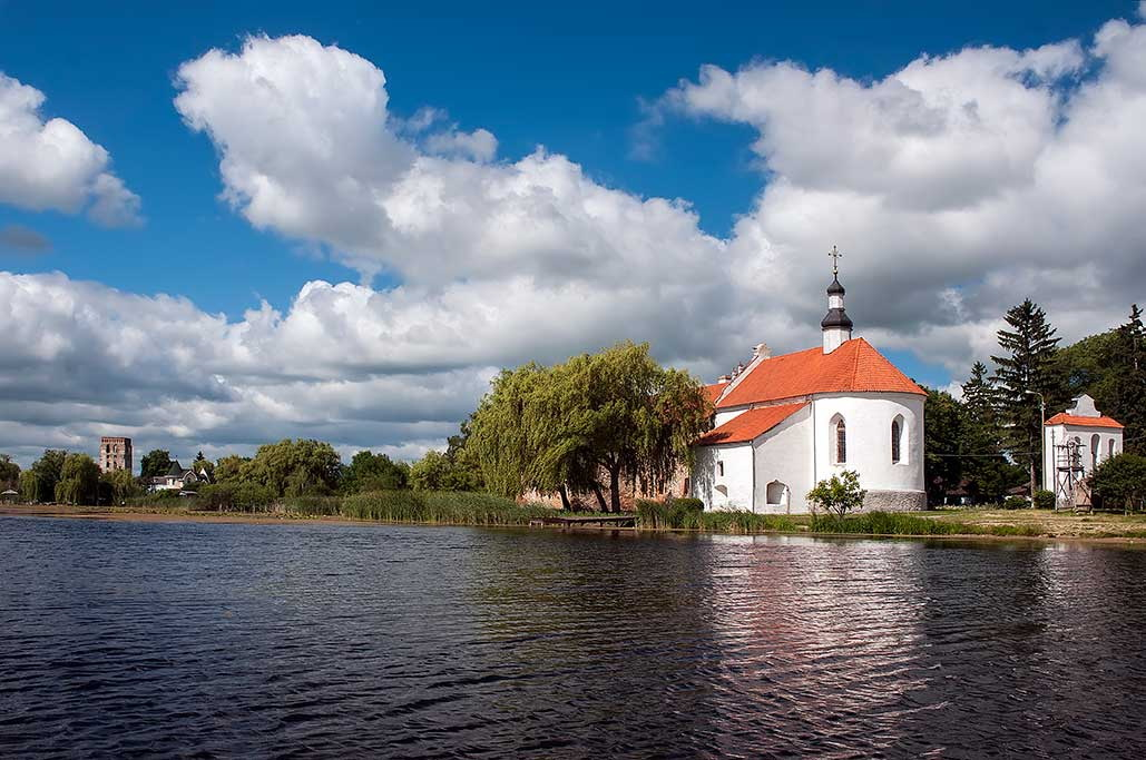 Замкова Троїцька церква